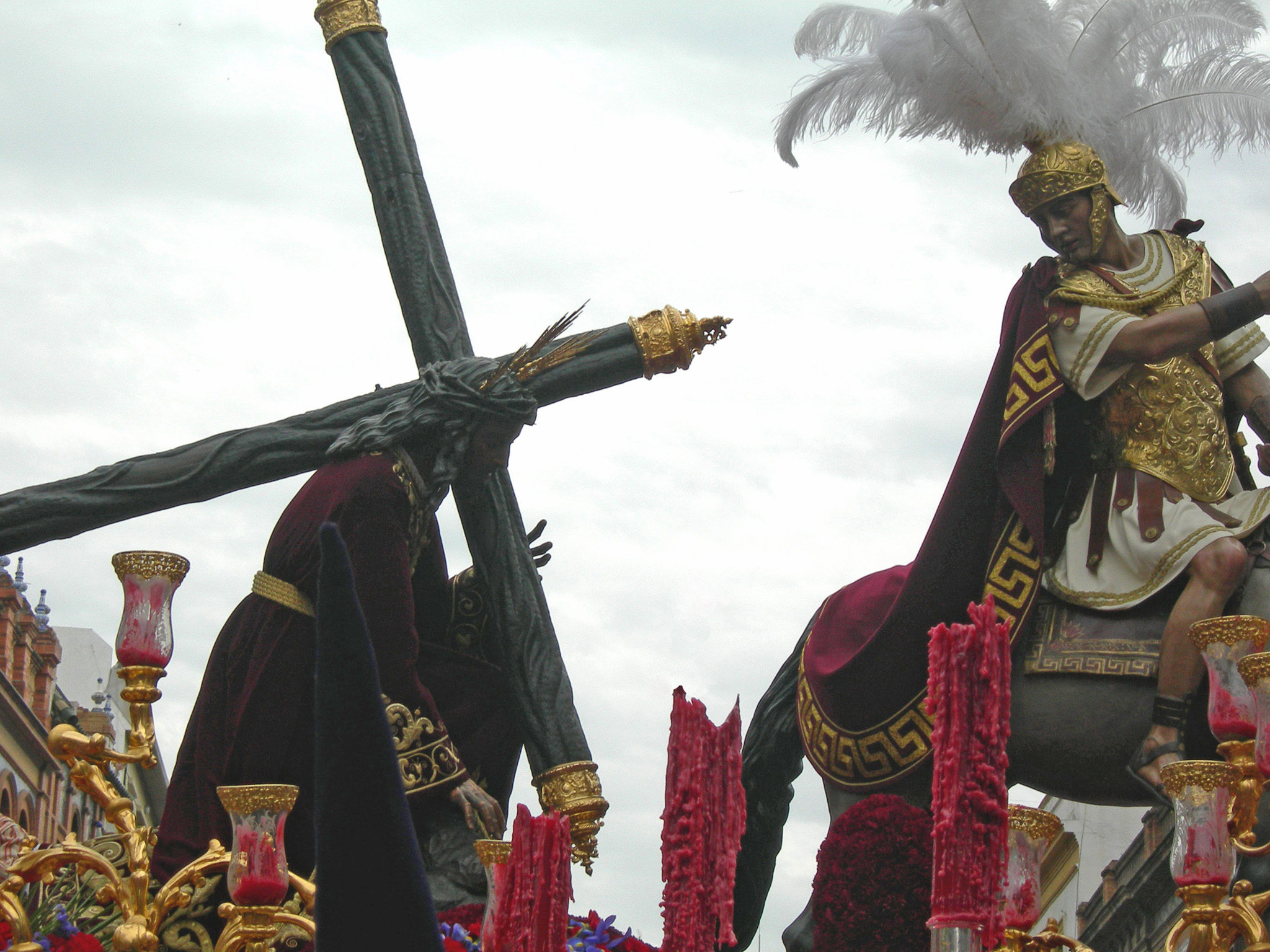 Semana Santa de Sevilla